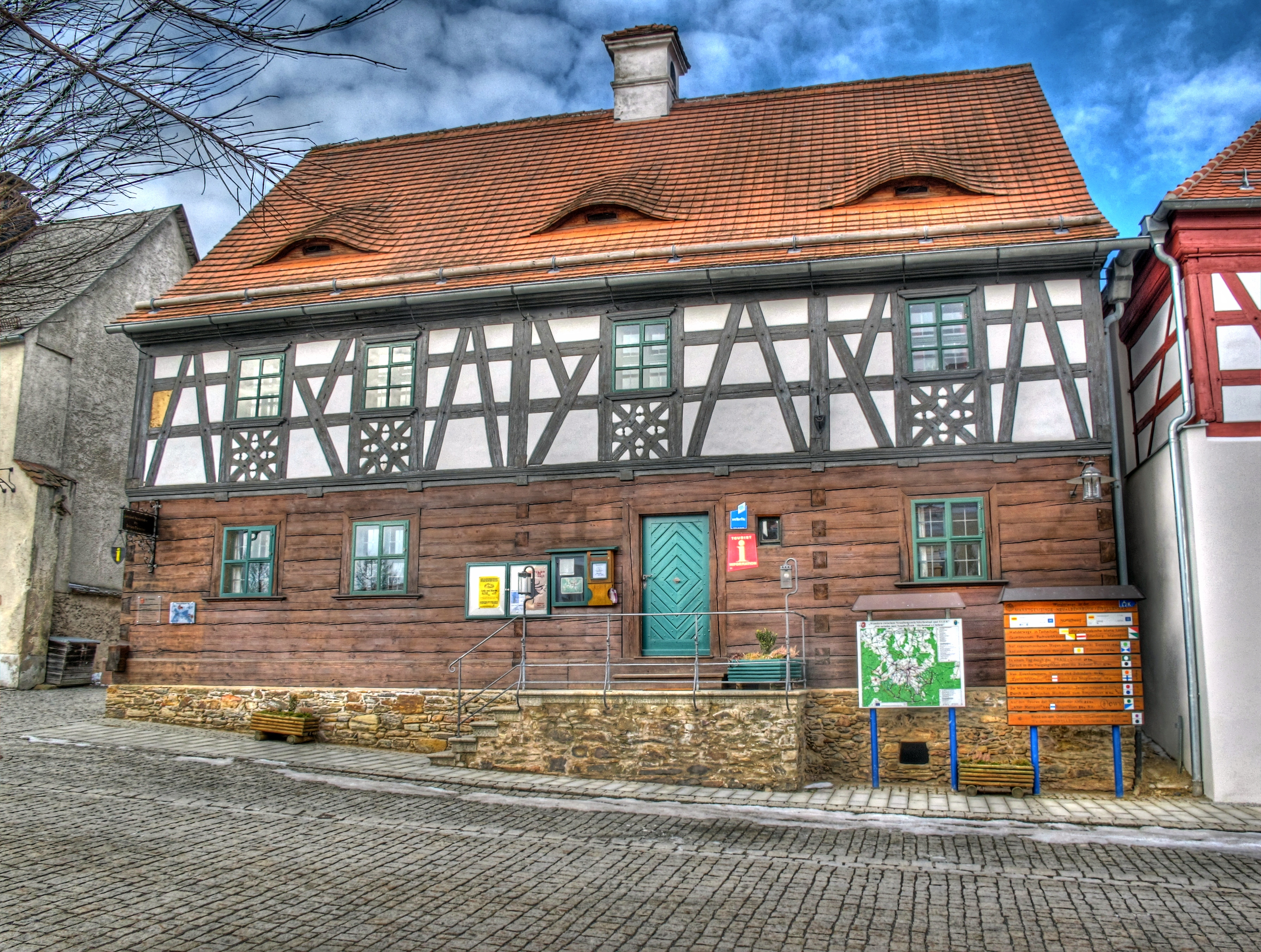 Deutschland, Bayern, Oberpfalz, Landkreis Tirschenreuth, Neualbenreuth, Fremdenverkehrsbüro